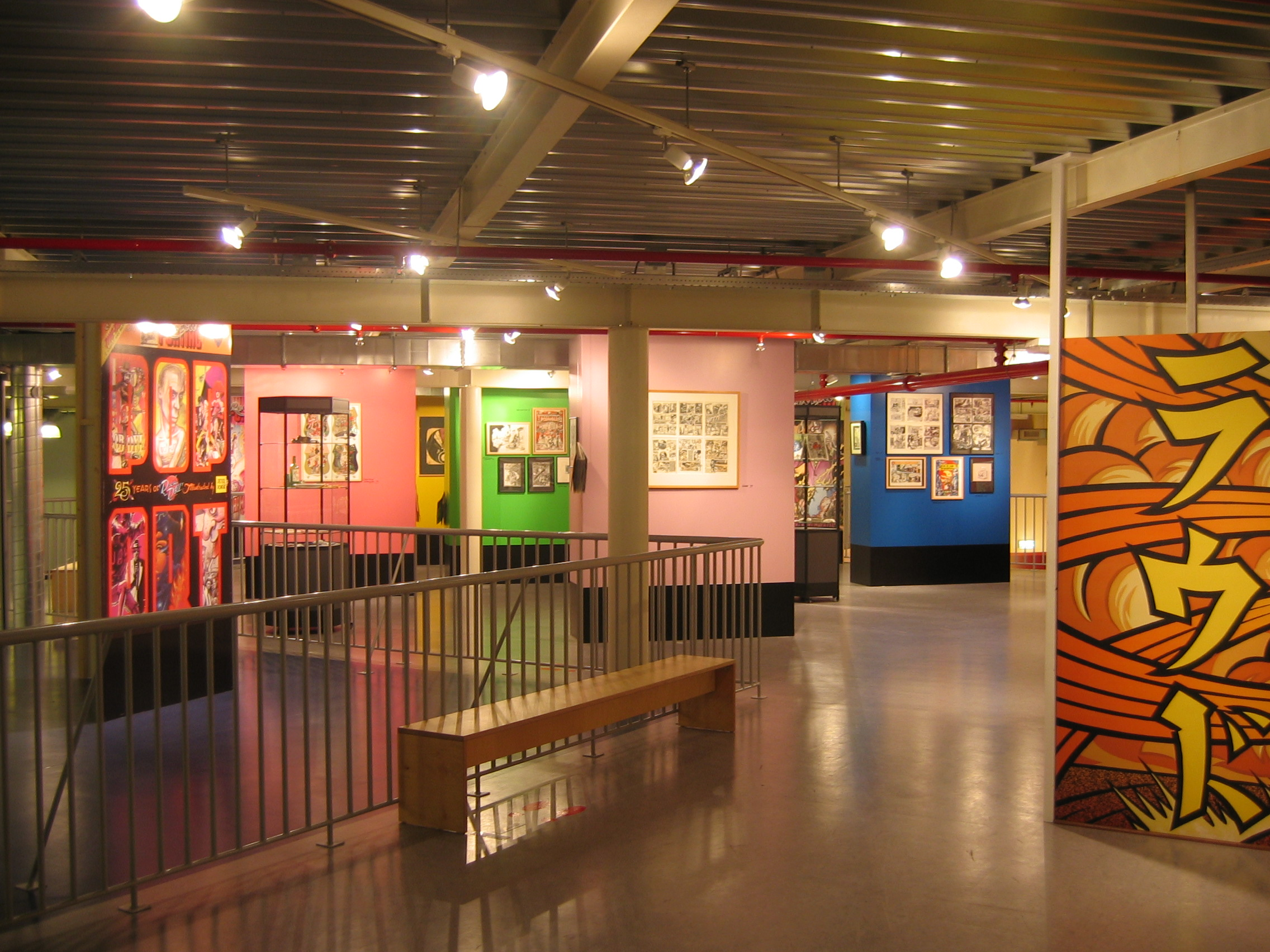 Deel van een zaal van het stripmuseum.